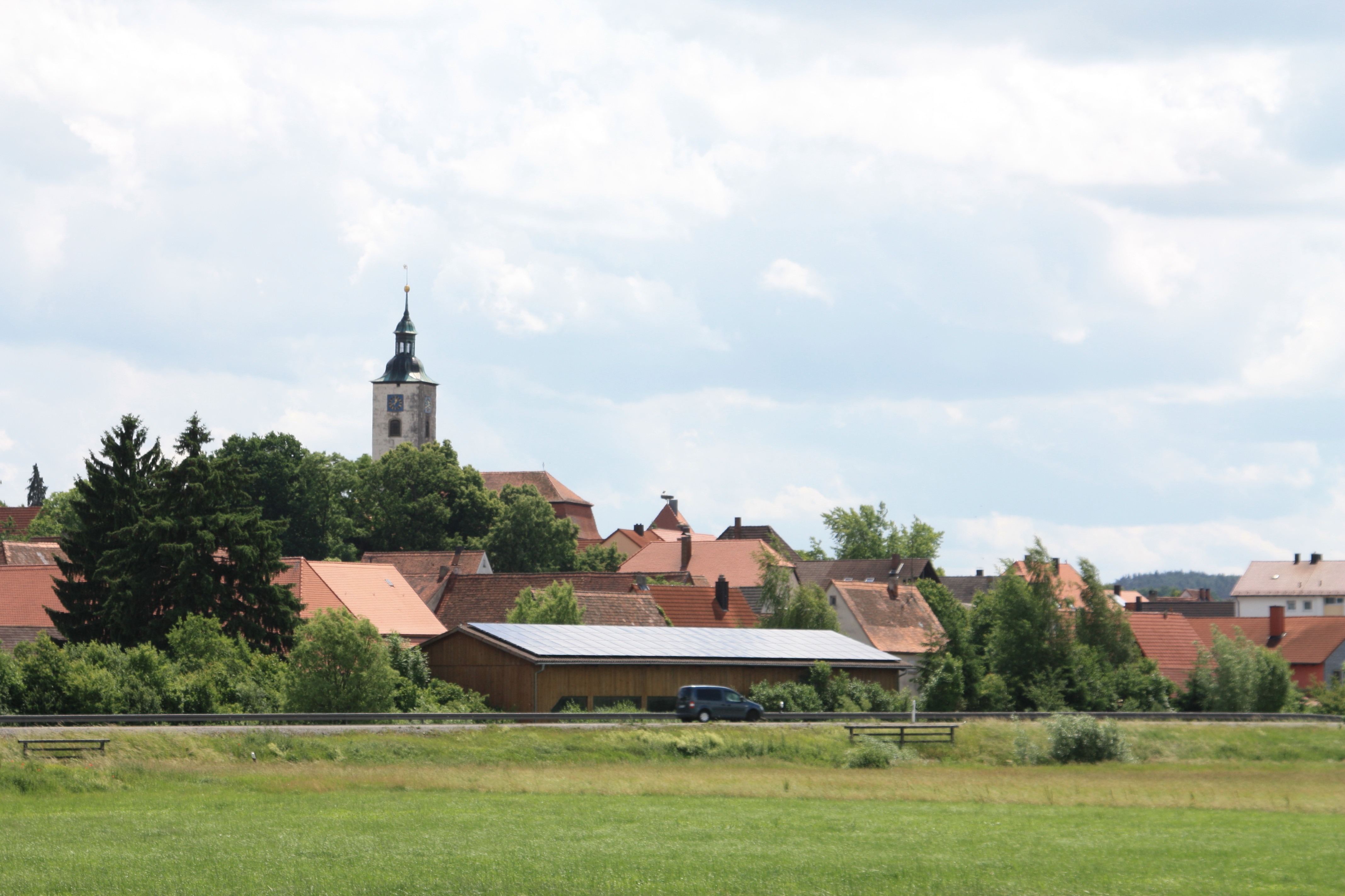 von Westen